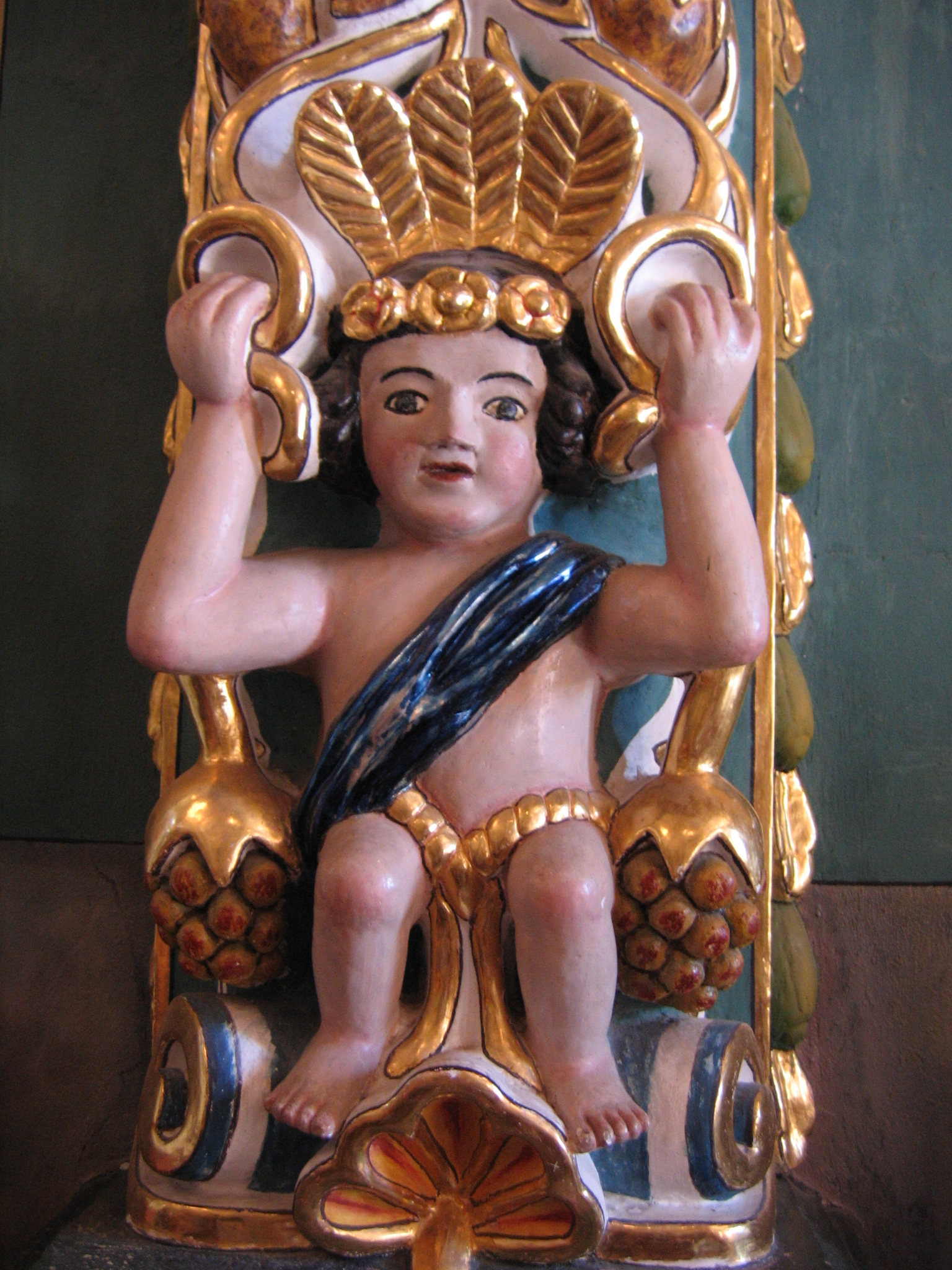 Personaje con penacho. Detalle de la iglesia de Santa María Tonantzintla, Puebla, México (foto de Bernardo Bolaños). Santa Maria Tonantzintla Church, Puebla, Mexico, photo by Bernardo Bolaños